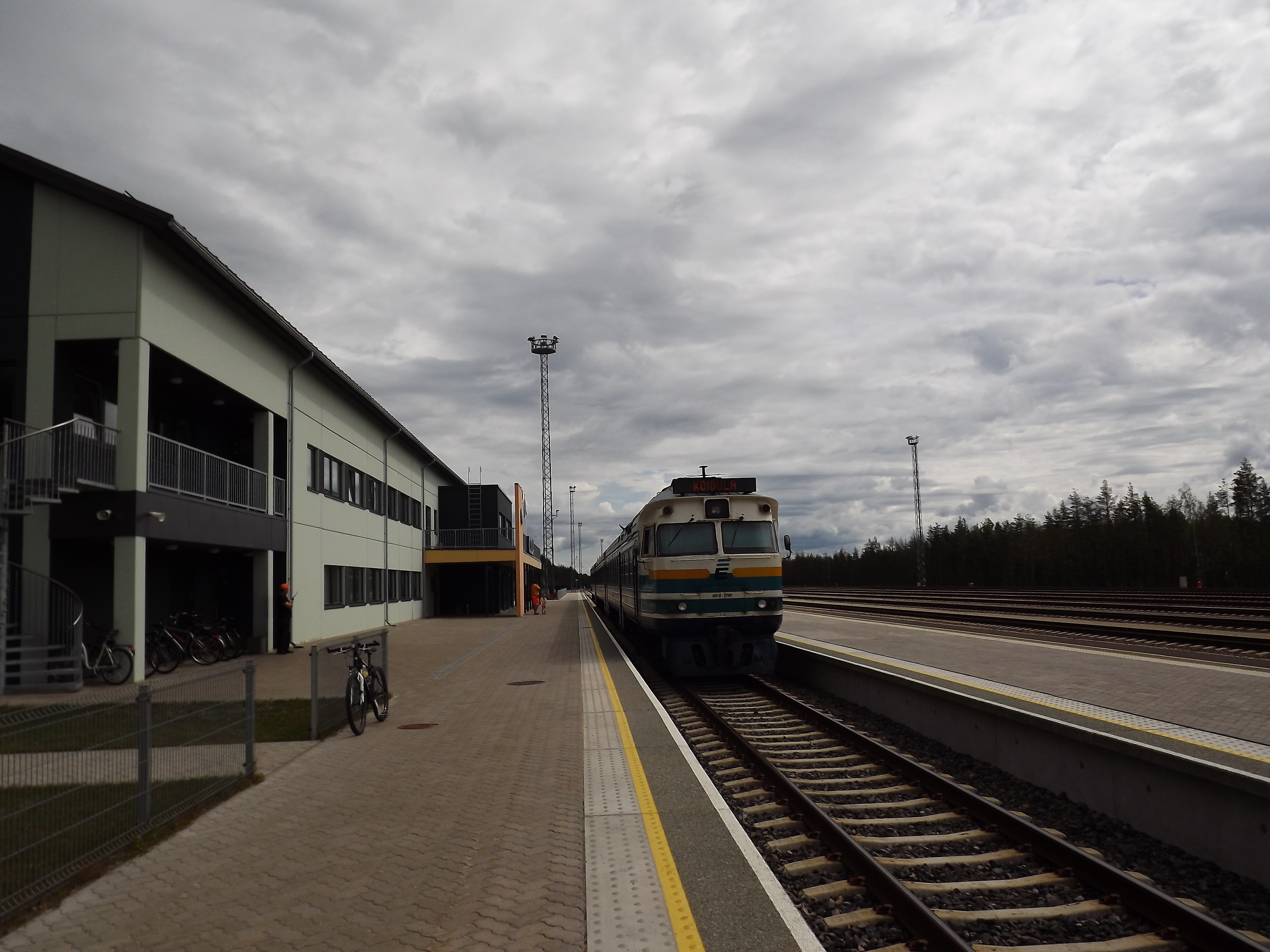 Reisirong (DR1B)